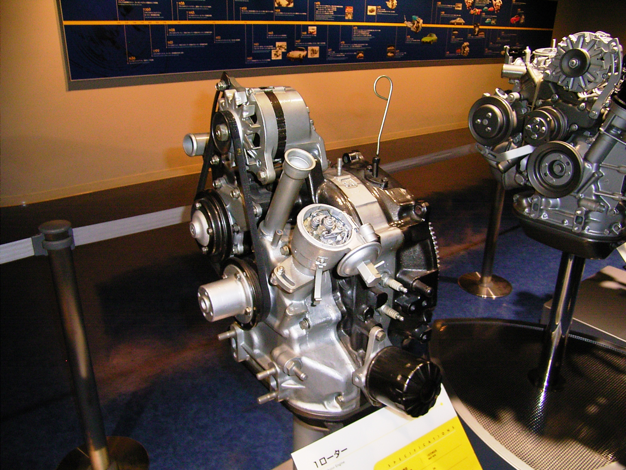 3A_type_rotary_engine_01(ja:3Aロータリーエンジン),Mazda Museum